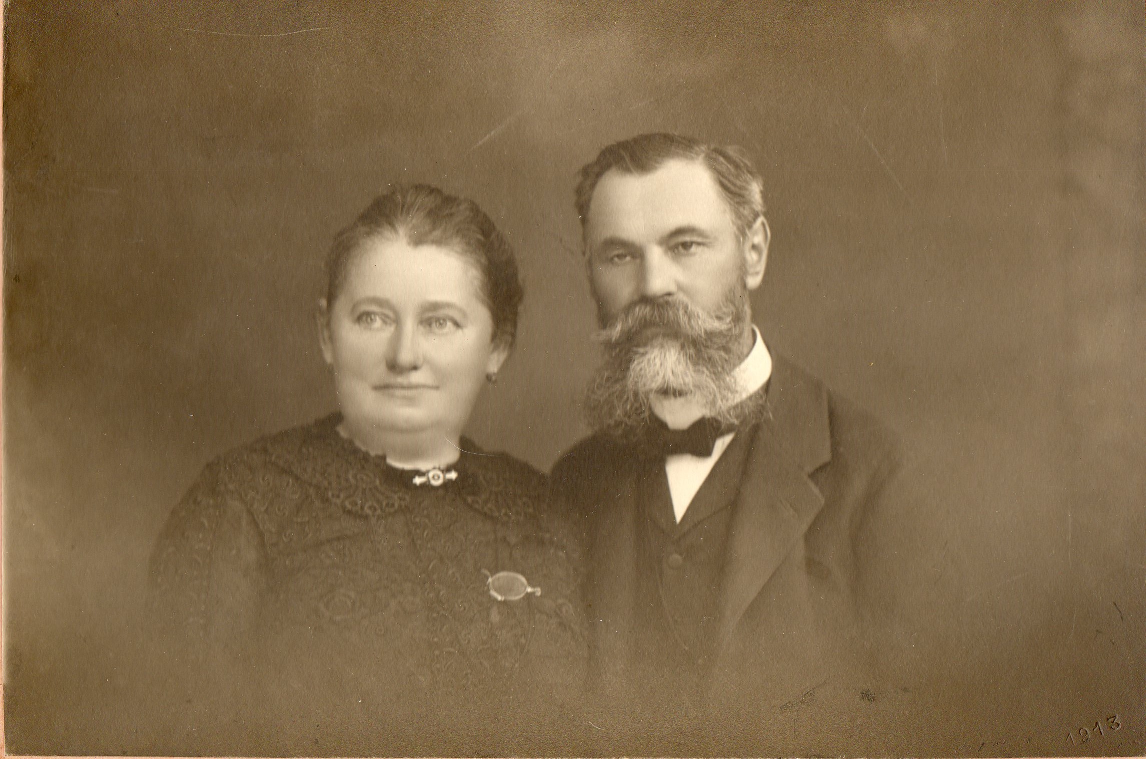 Antonín Dvořák s manželkou Josefou roz. Toufarovou